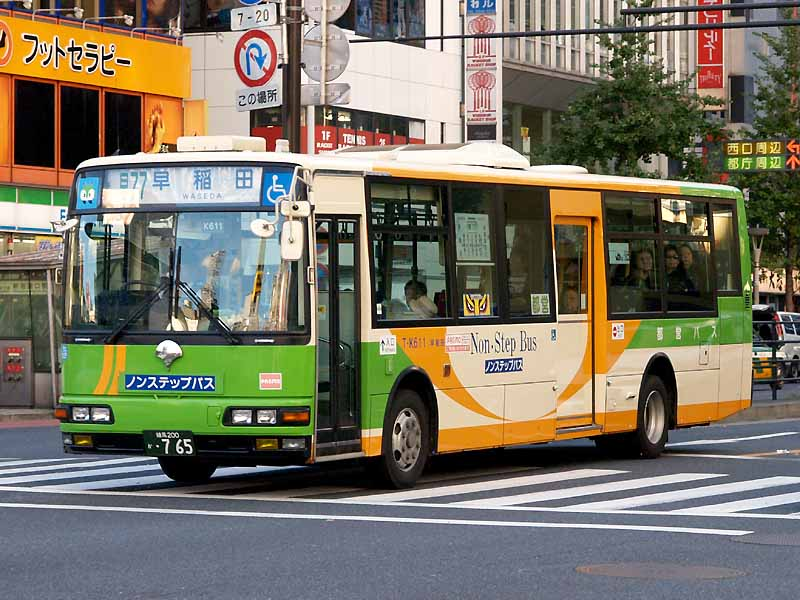 2002年に導入された東京都交通局の三菱ふそうエアロミディMKロング。新宿・千住・早稲田に計20台配置されているが、その後の追加投入は行われていない。 練馬200か・765（KK-MK27HM：局番T-K611、早稲田自動車営業所） 2007年11月13日、東京都新宿区・新宿大ガード付近にてComyu撮影